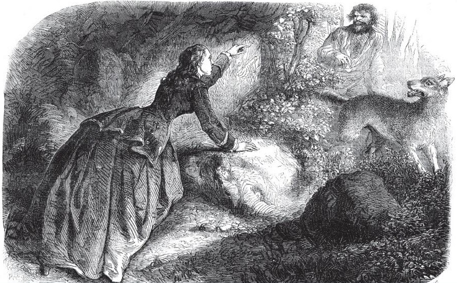 Jeannot Grandes Dents et la Bête du Gévaudan. Gravure extraite du roman-feuilleton La Bête du Gévaudan d'Élie Berthet, Journal pour tous, no 148, 30 janvier 1858 [1].